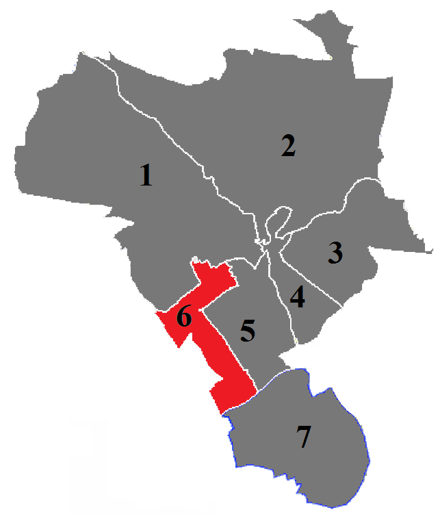 Situation du canton dans la ville de Nîmes